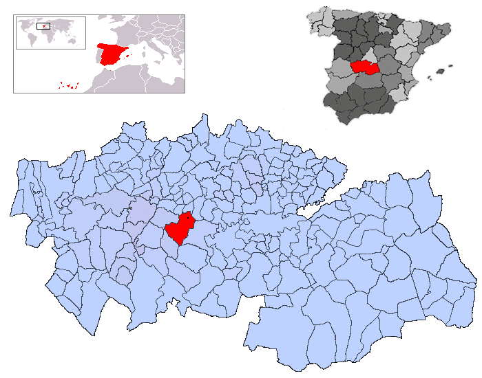 El Carpio de Tajo en la provincia de Toledo